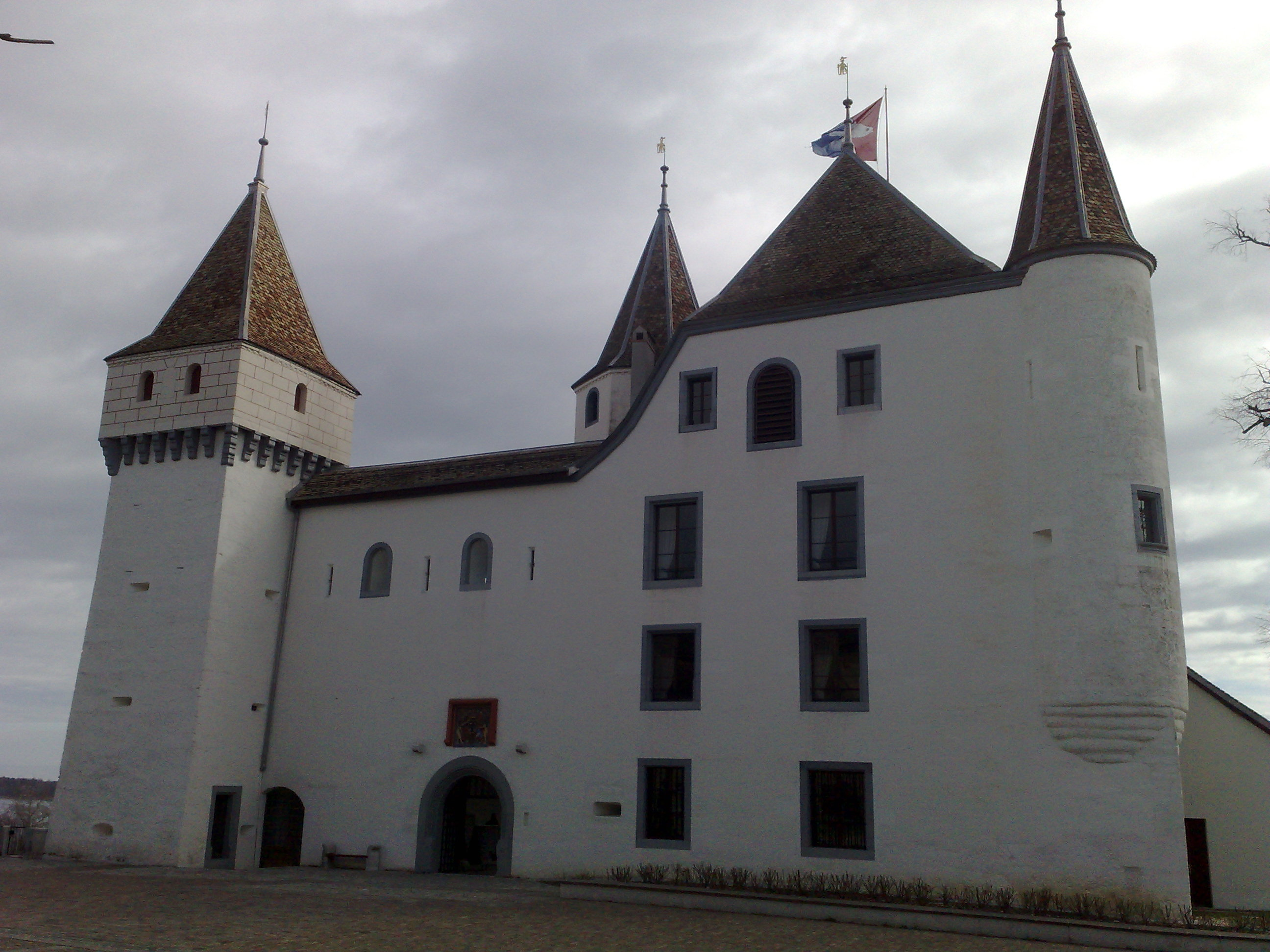 Le château de Nyon